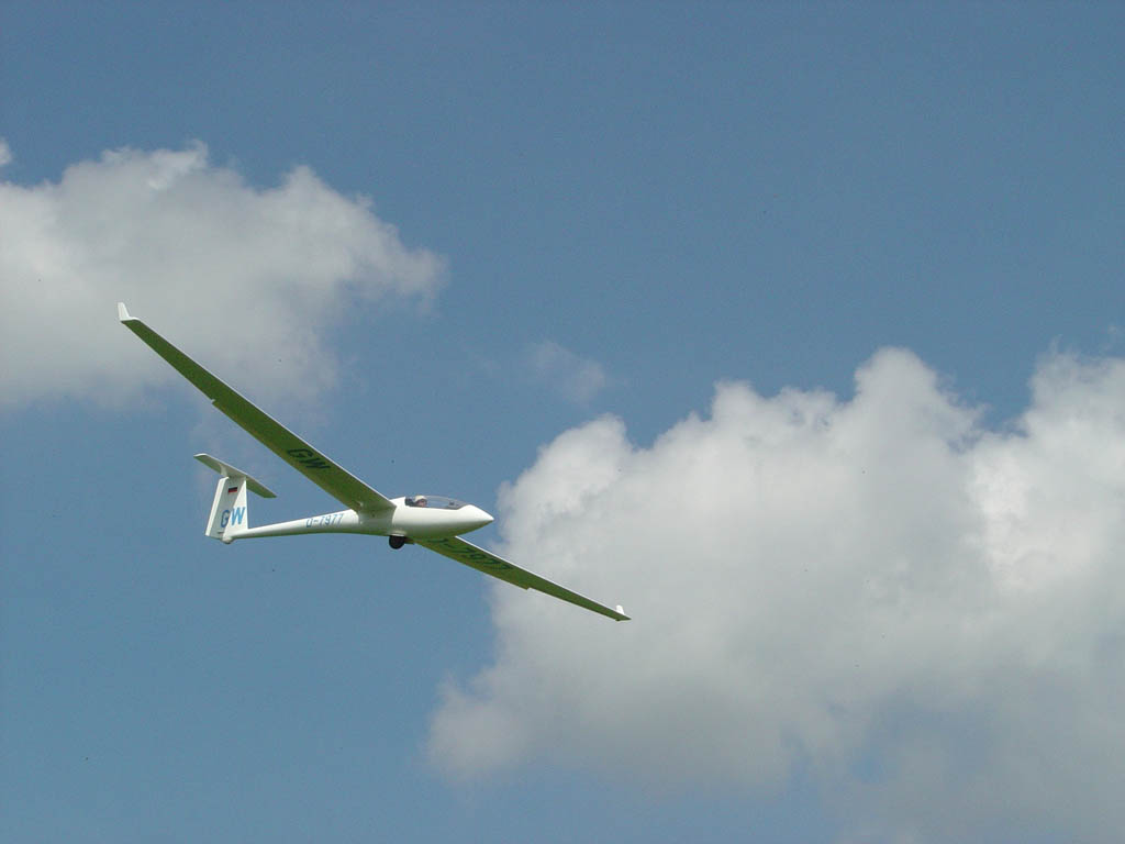 Segelflugzeug bei der Landung